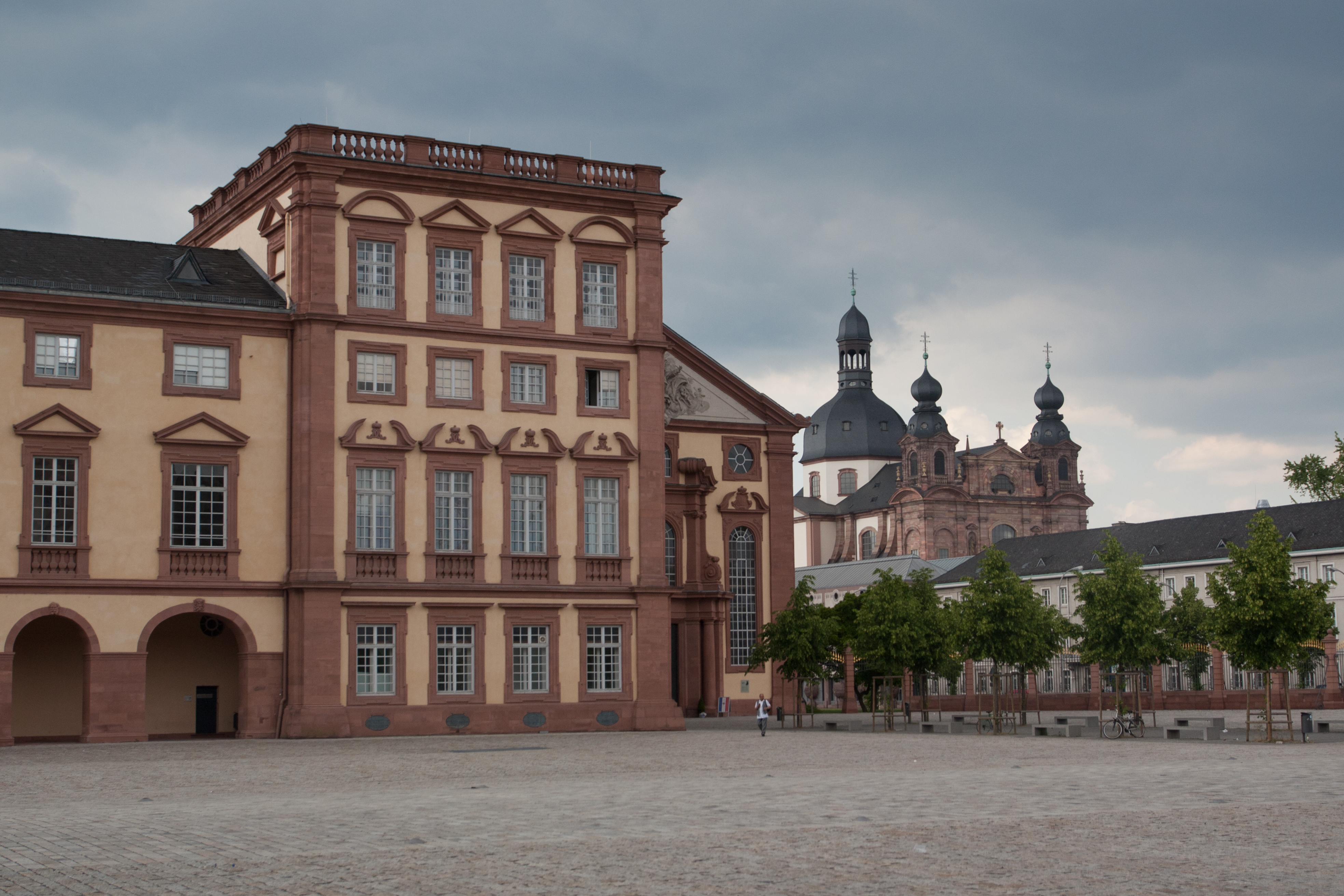 Schloss und Jesuitenkirche, Mannheim